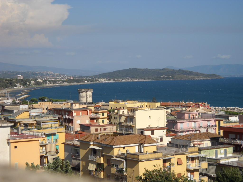 Formia_Panorama_dalla_stazione_ferroviaria